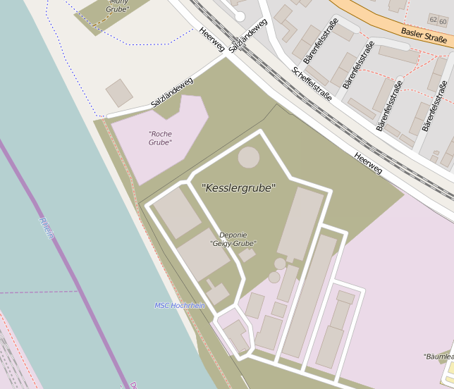 Openstreetmaps Kesslergrube